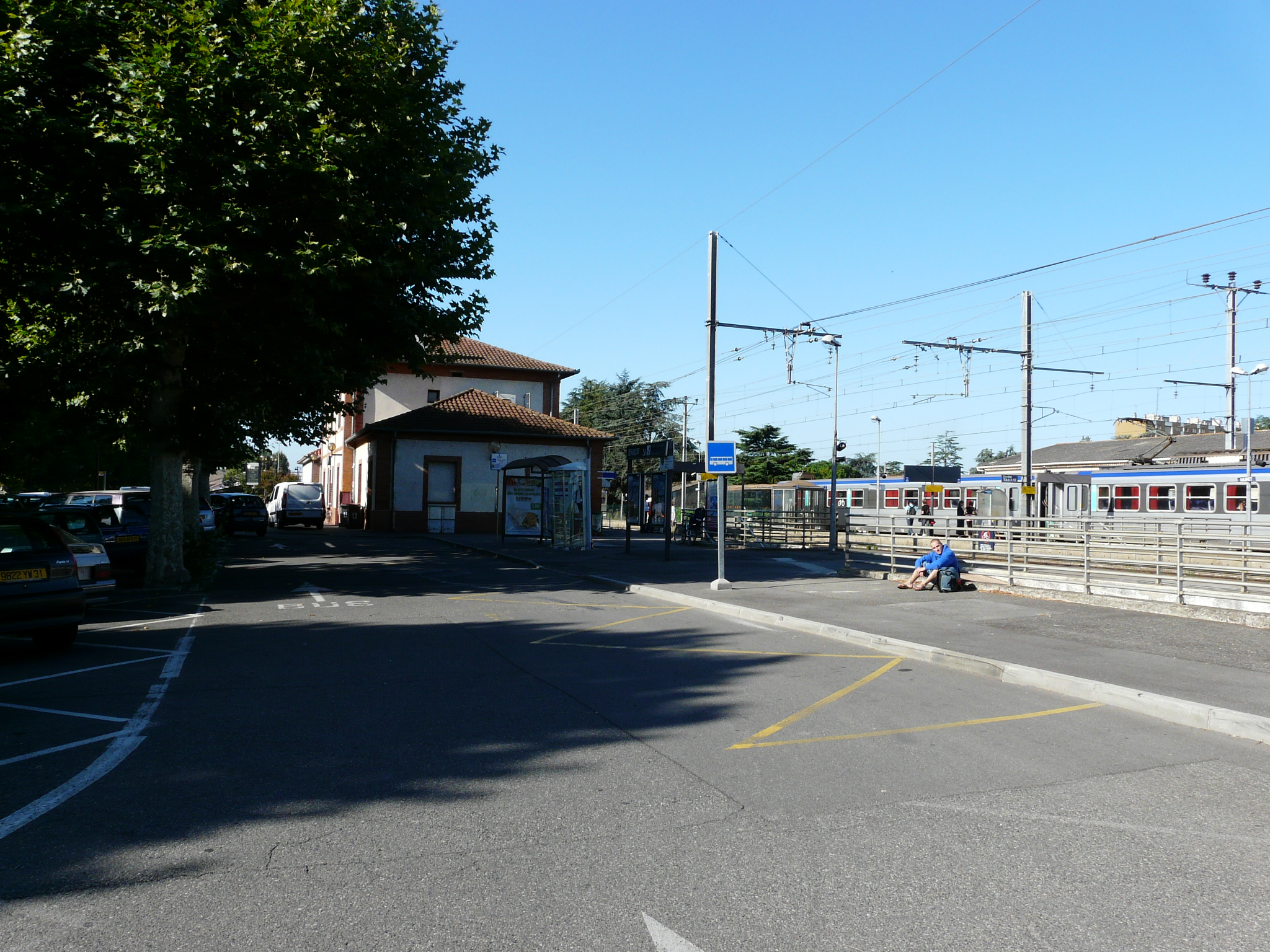 Gare de Muret (Haute-Garonne, France).